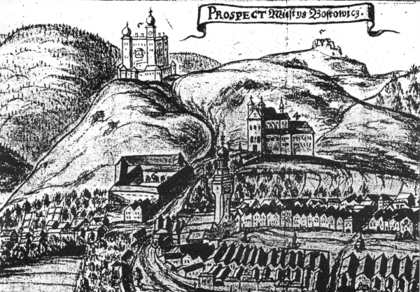 Boskovice - pohled na hrad, baštu, dvůr a klášter na místě zámku v první čtvrtině 18. století